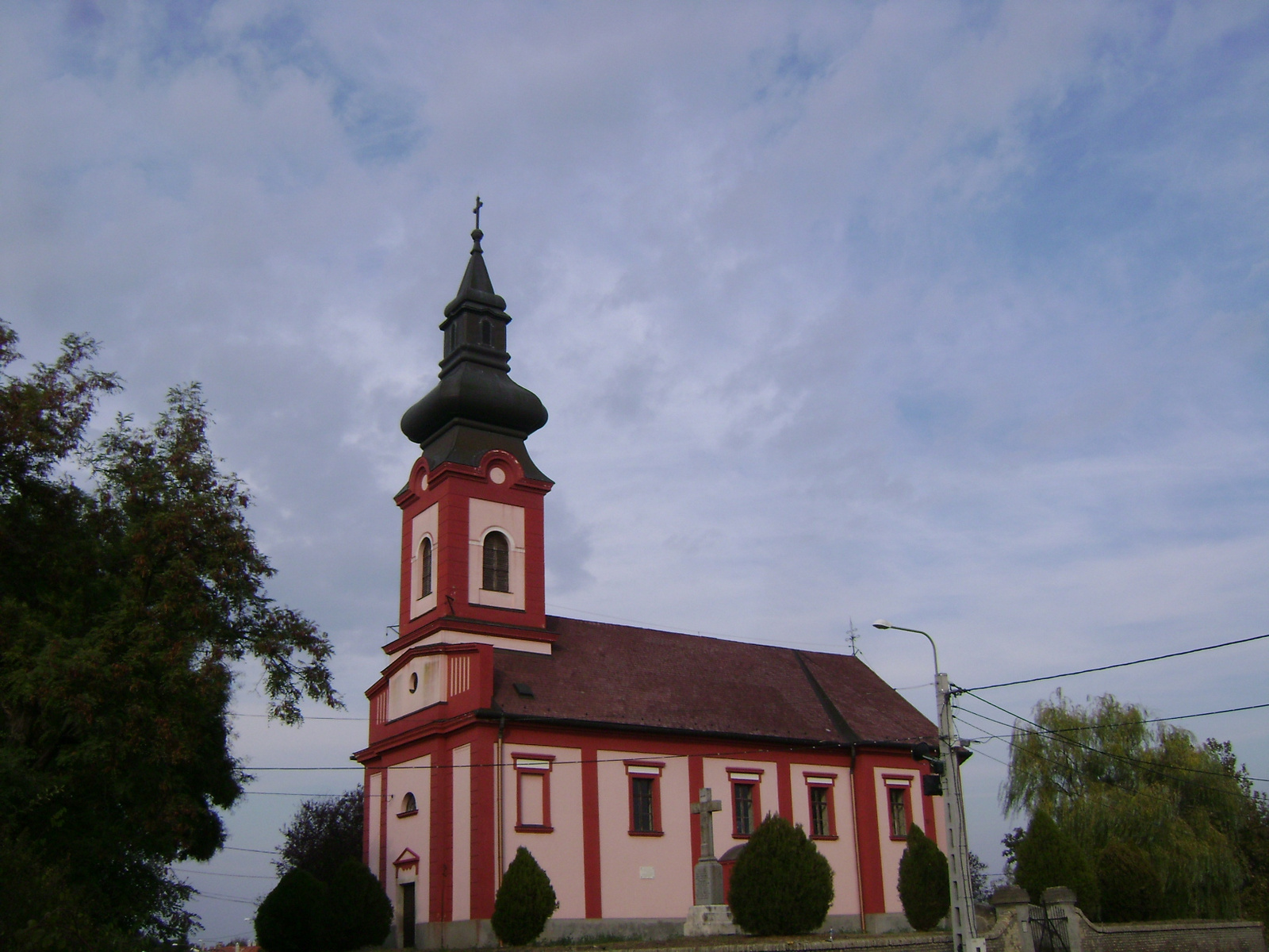 Gör. kel. templom (Szeged, SZŐREG, Szerb utca) This is a photo of a monument in Hungary, Identifier: 3526